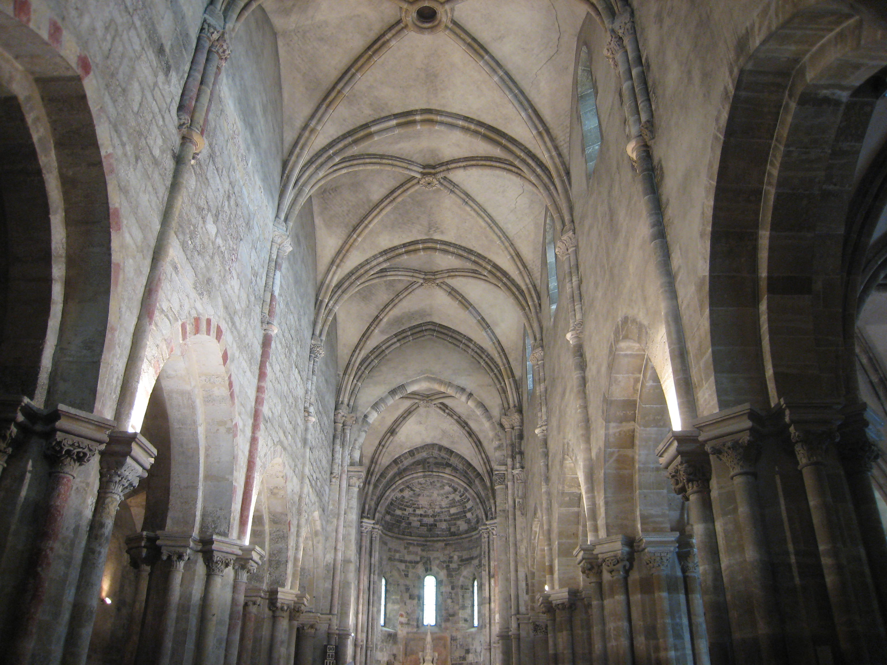 Cerkev sv. Jurija, Ják, Madžarska; glavna ladja.